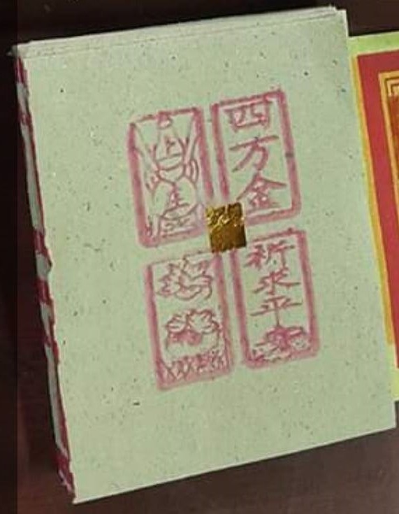 四方金的特製版本，畫有葫蘆、仙鶴等吉祥圖案，中臺灣使用，可以燒給神靈或者死亡三年以上的鬼魂。